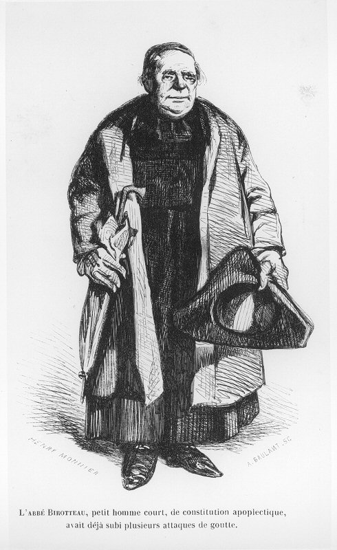 Illustration d'Henry Monnier pour Le Curé de Tours d'Honoré de Balzac. Voir Musées de la Ville de Paris